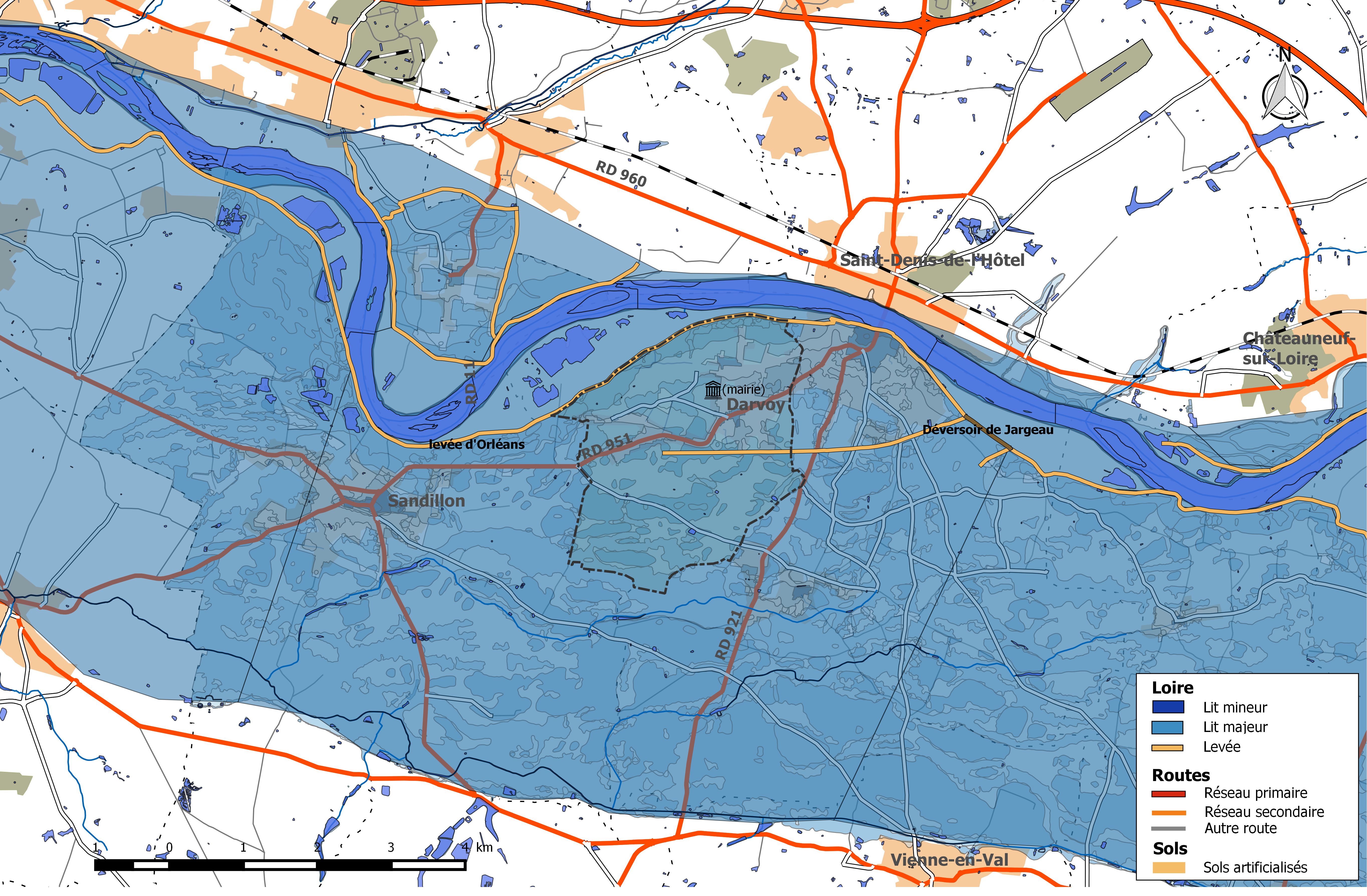 Zone inondable et réseaux hydrographique et routier de la commune de Darvoy.